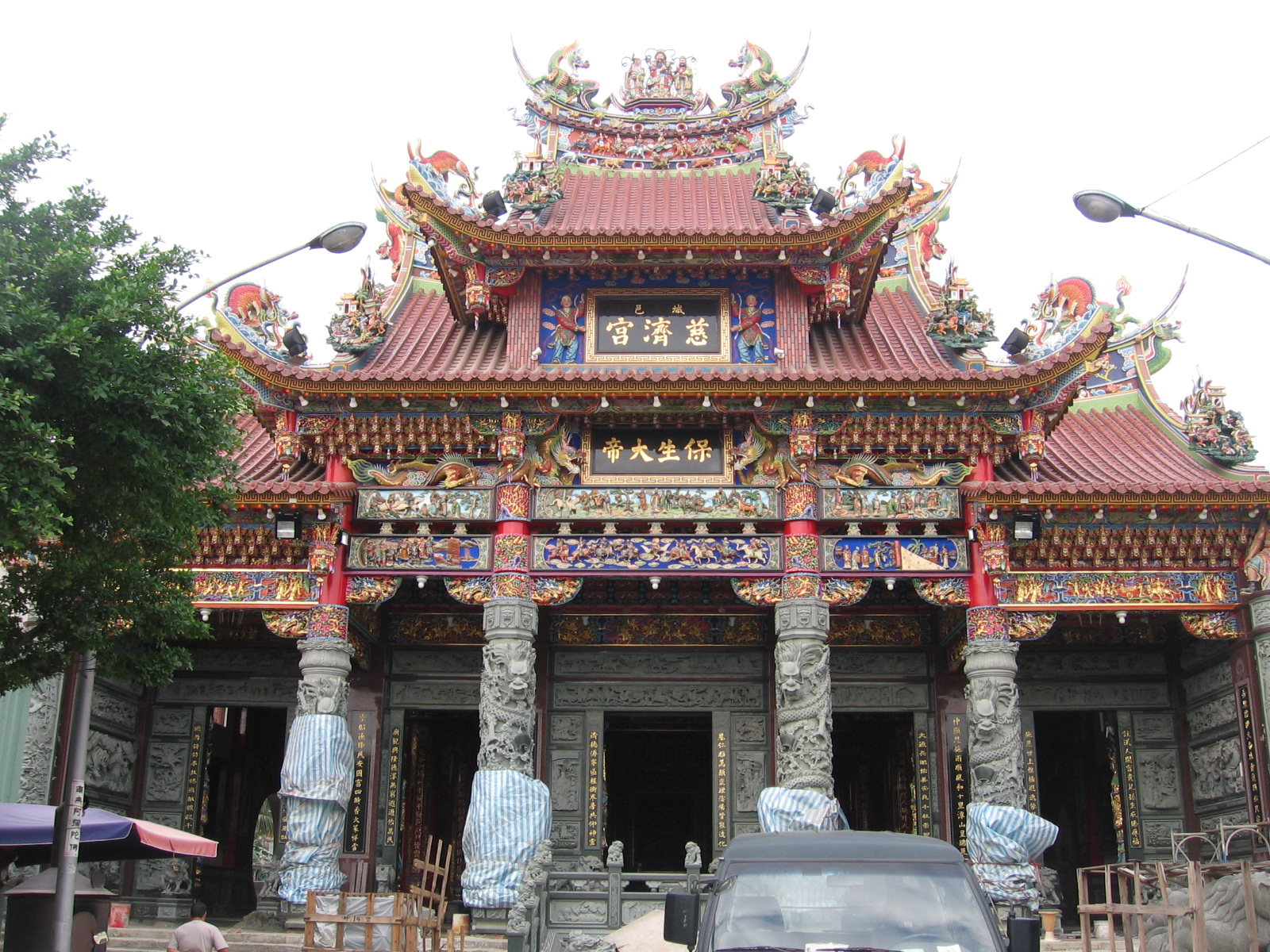 Lotus Lake, Kaohsiung, Taiwan